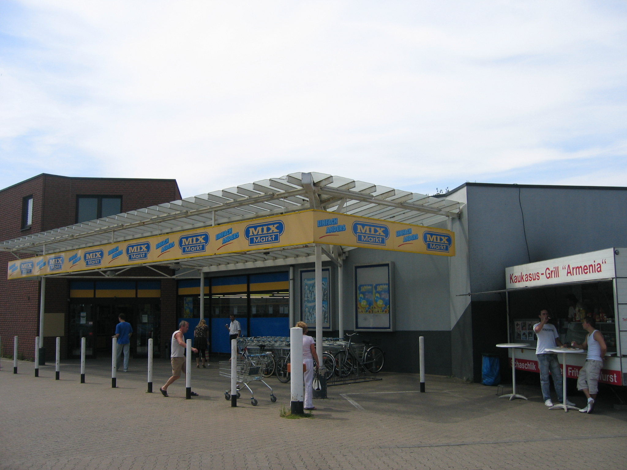 MixMarkt-Filiale, Düren